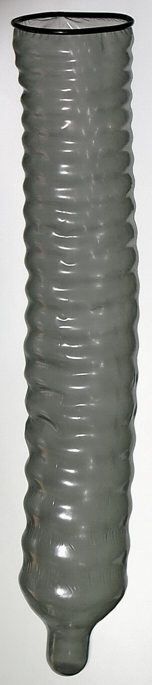 Schwarzes Kondom, abgerollt, hängend. Foto von eigenem Eigentum in eigener Wohnung